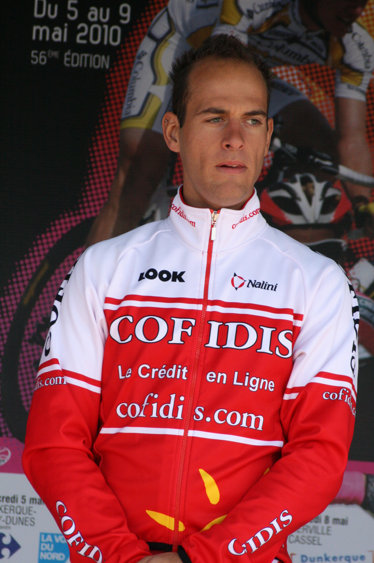 Kevyn Ista, lors de la présentation des équipes des 4 jours de Dunkerque 2010